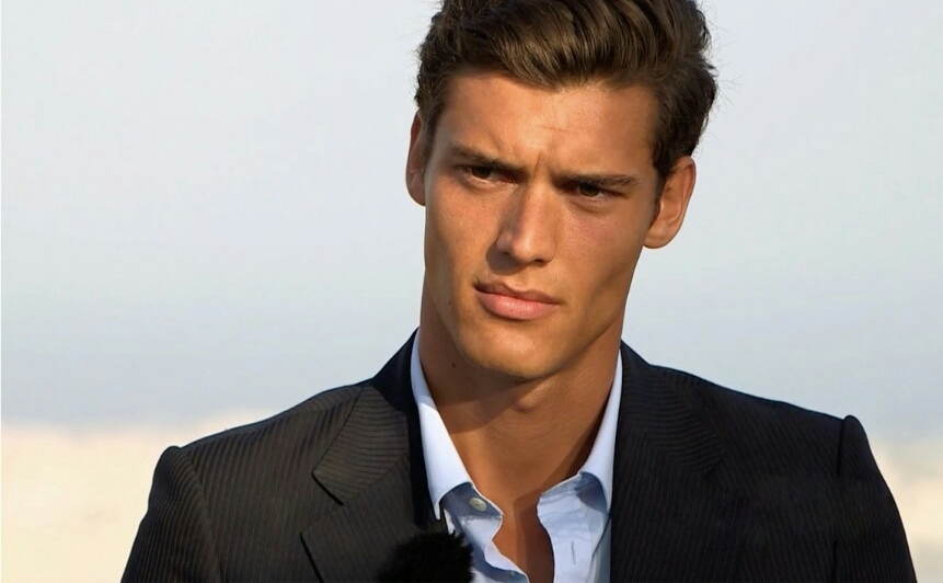 Myroslaw Slawow in Hemd und Anzug fotografiert Oktober 2014